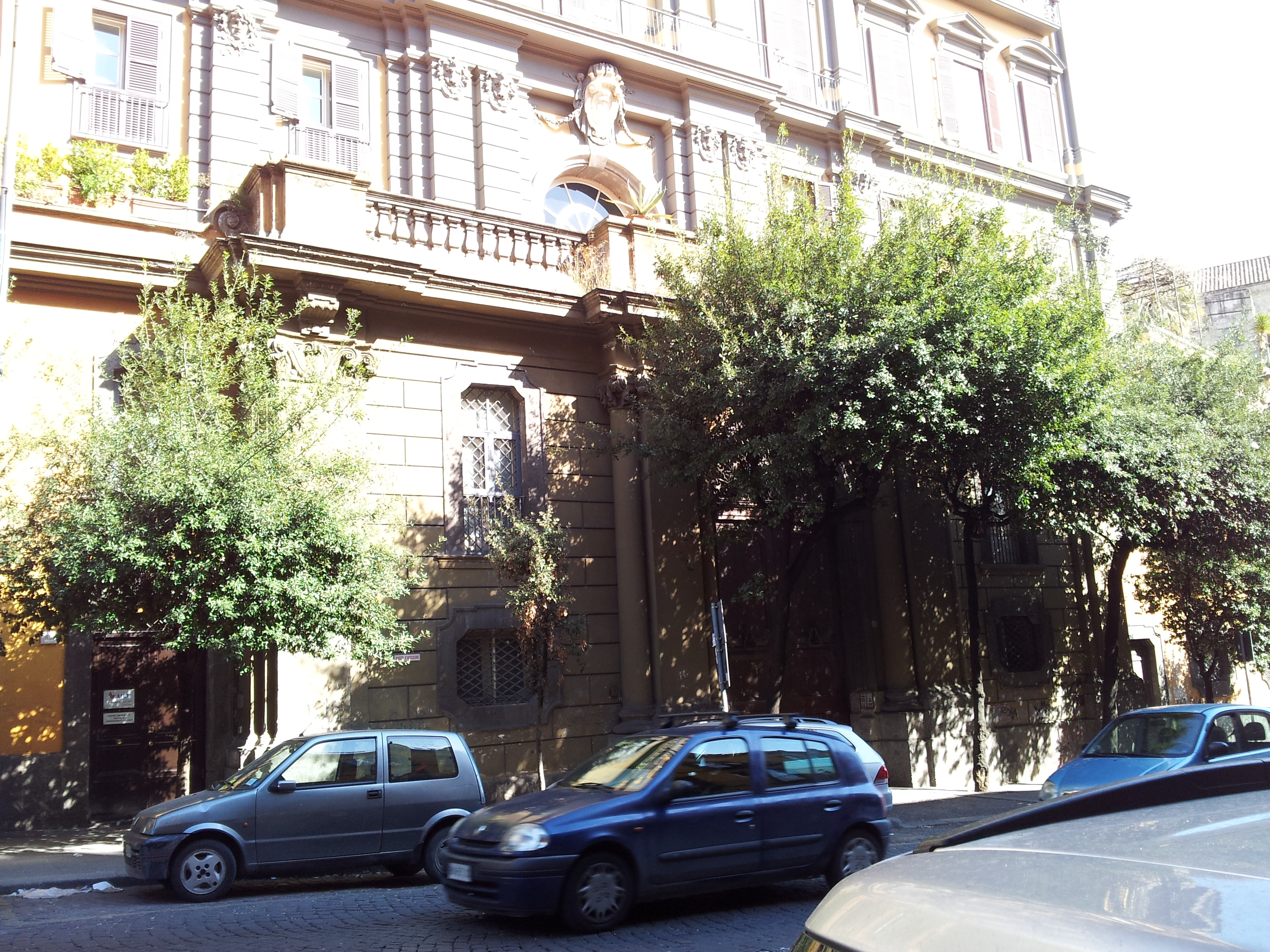 Palazzo Albertini di Cimitile (Napoli)